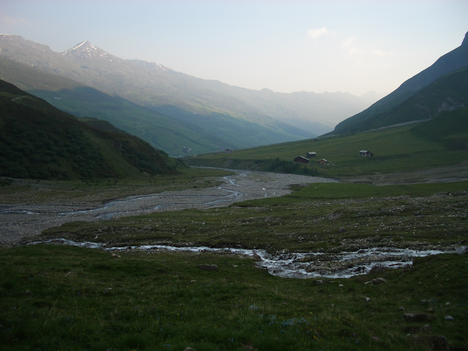 Safien GR, Switzerland self-made, June 2006